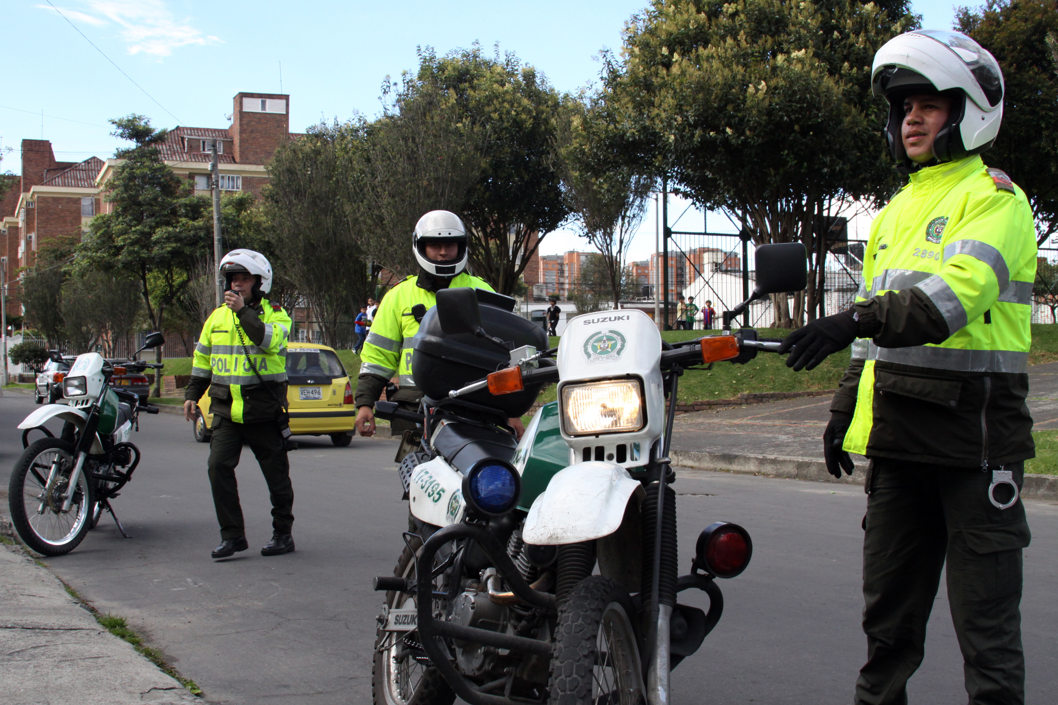 Los hombres de la Policía Metropolitana de Bogotá atienden a los ciudadanos en sus cuadrantes